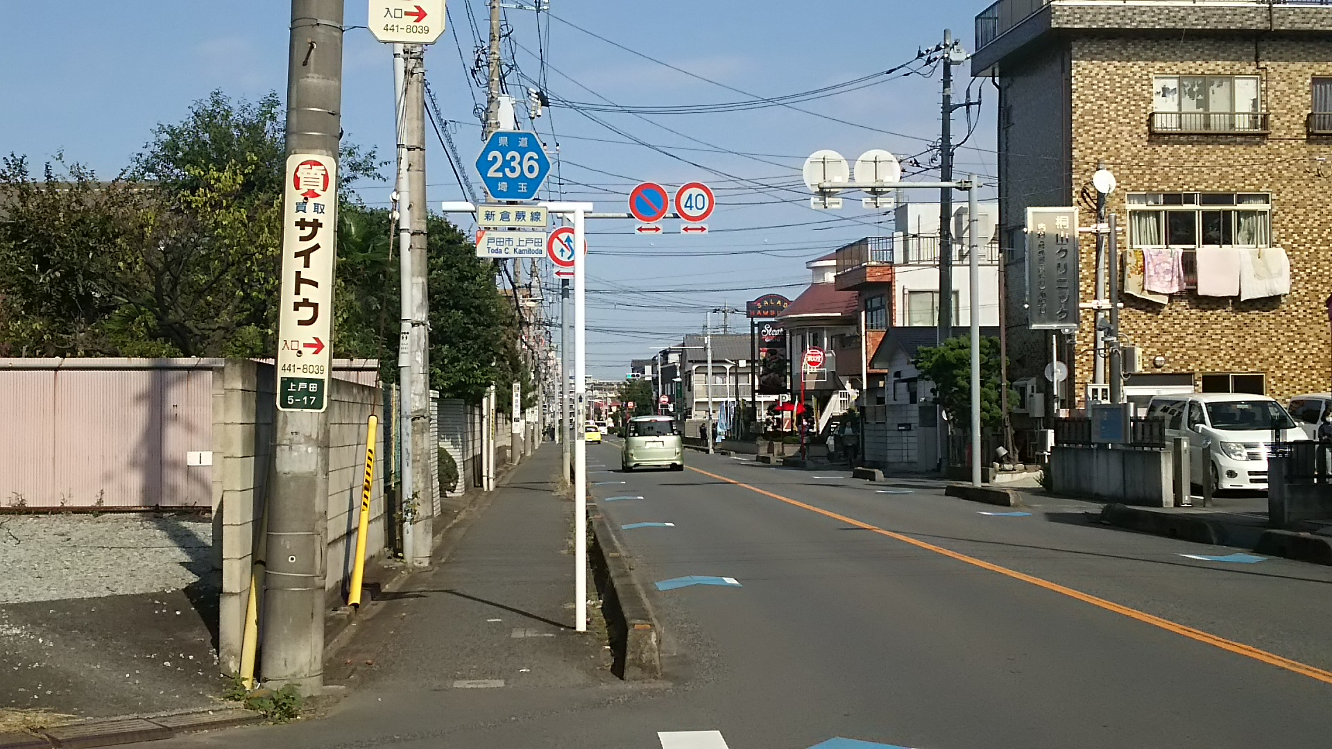 五差路交差点付近にて